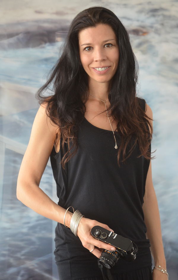 Die Fotokünstlerin und Filmregisseurin Franziska Stünkel mit ihrer Leica in ihrer Ausstellung Coexist Part 4 in der Galerie Robert Drees in Hannover ...